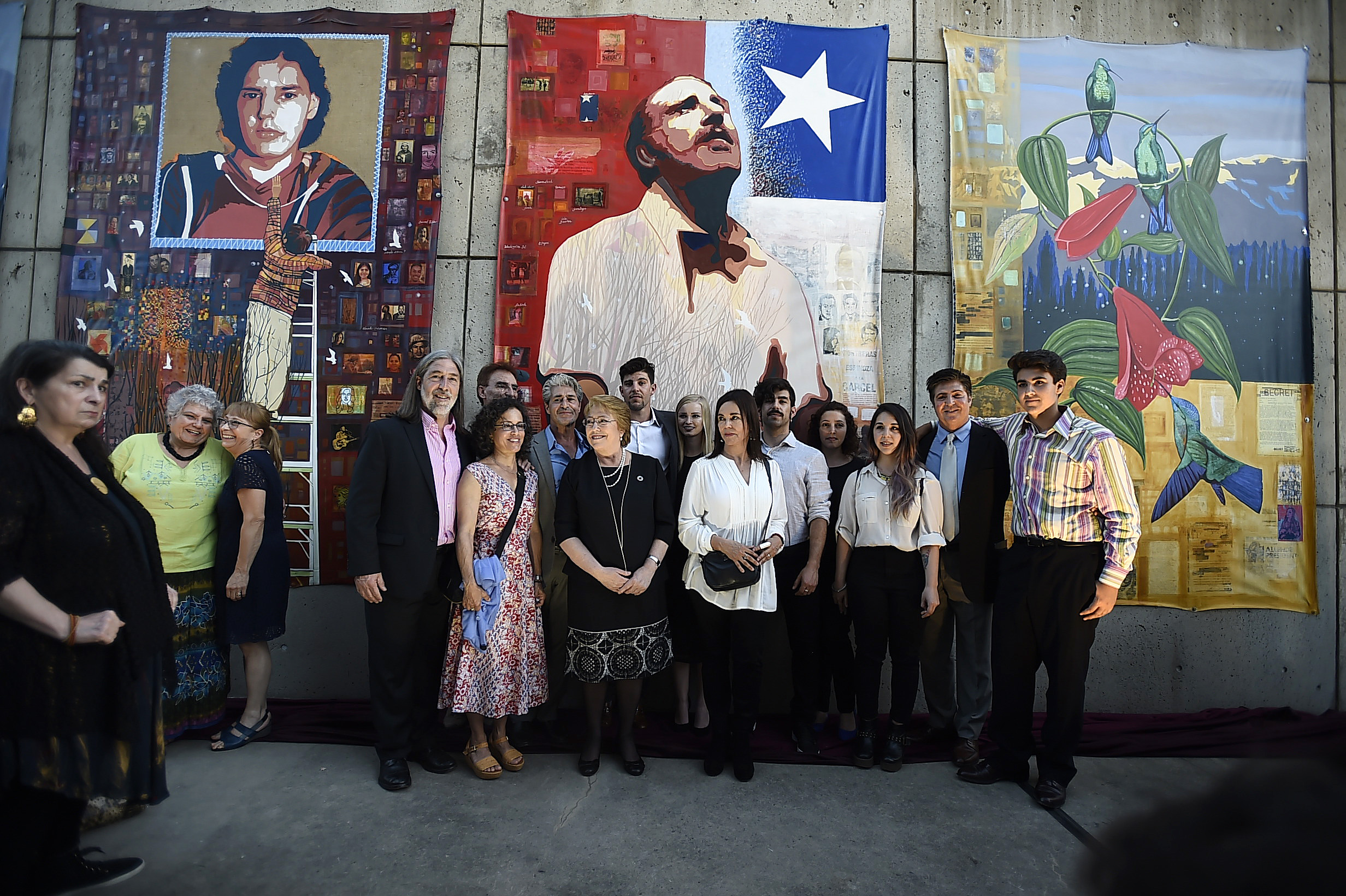 Gobierno de Chile: Presidenta Michelle Bachelet participa en la inauguración del Mural sobre Orlando Letelier.